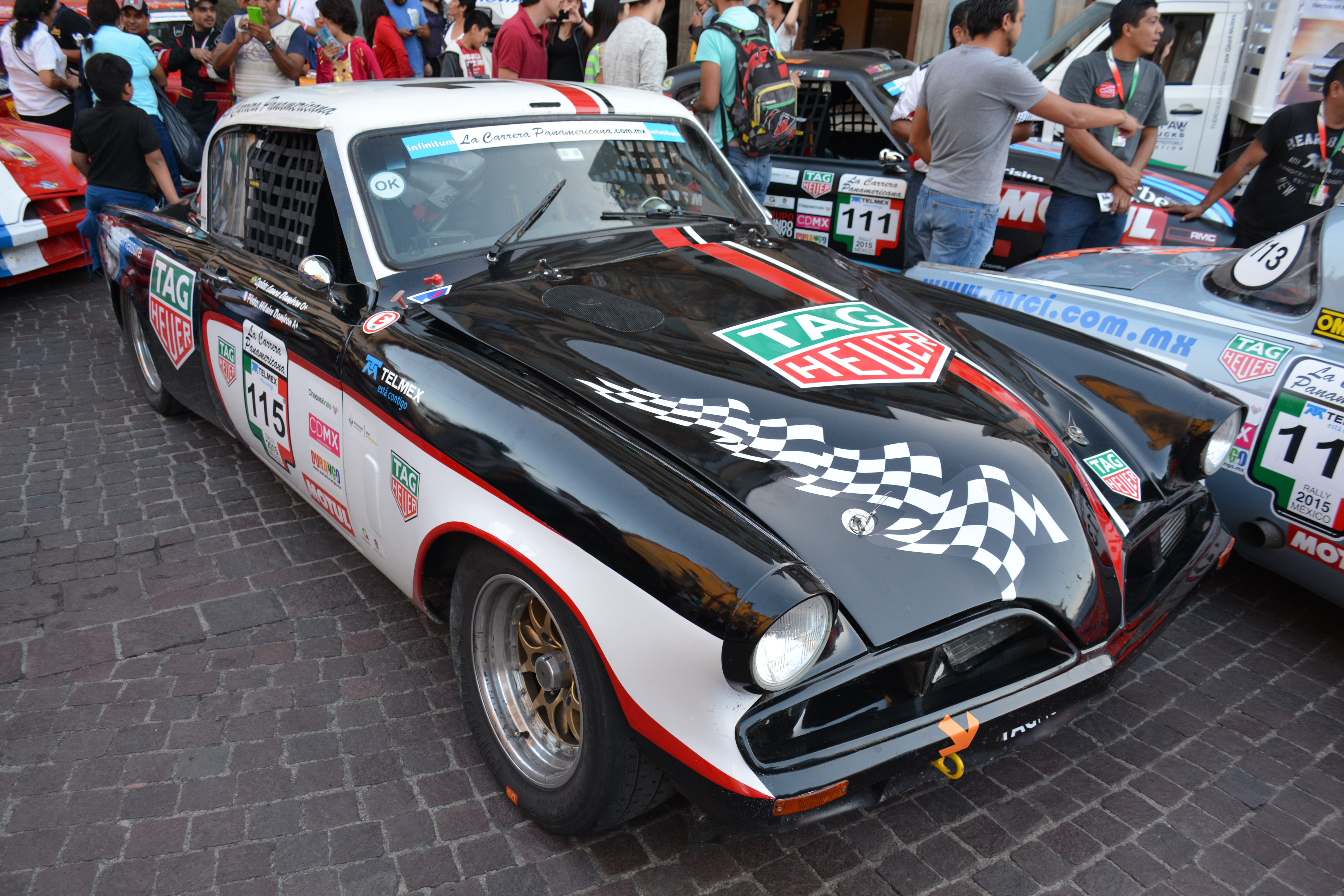 Autos de la Carrera Panamericana 2015 en Guanajuato en la calle Sopena de Guanajuato, Guanajuato.